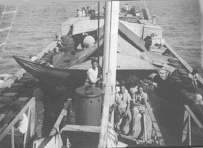 על סיפון אנית המעפילים קרב עמק איילון